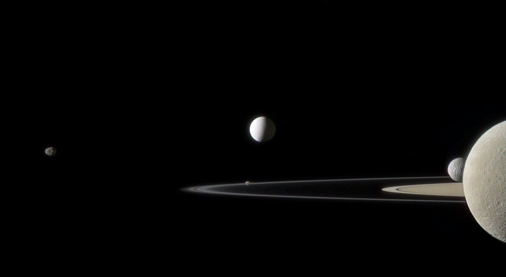 КА "Кассини" сфотографировал сразу пять спутников Сатурна.